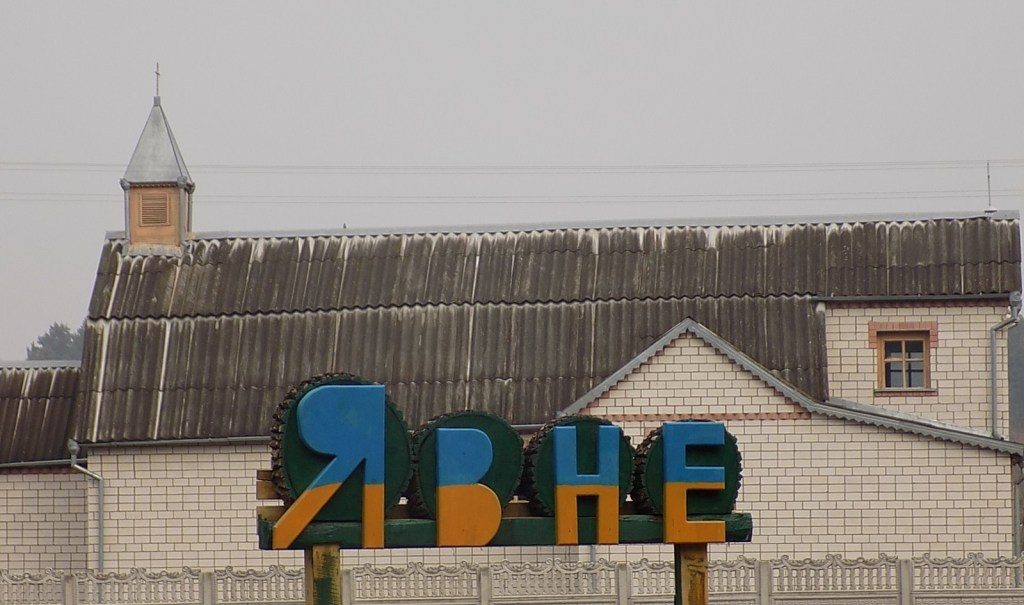 знак Явне